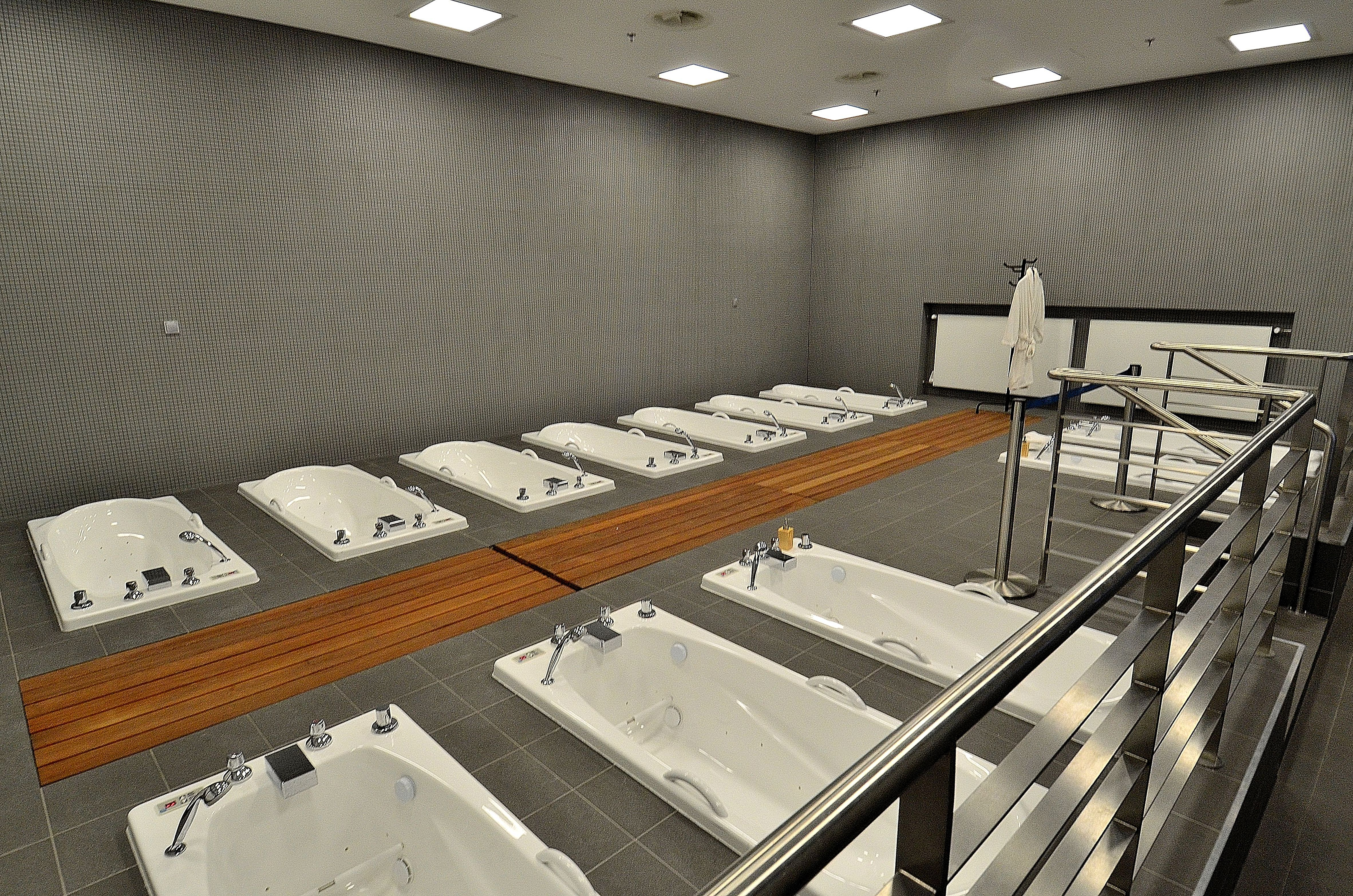 Sala do hydromasażu dla zawodników na Stadionie Narodowym w Warszawie